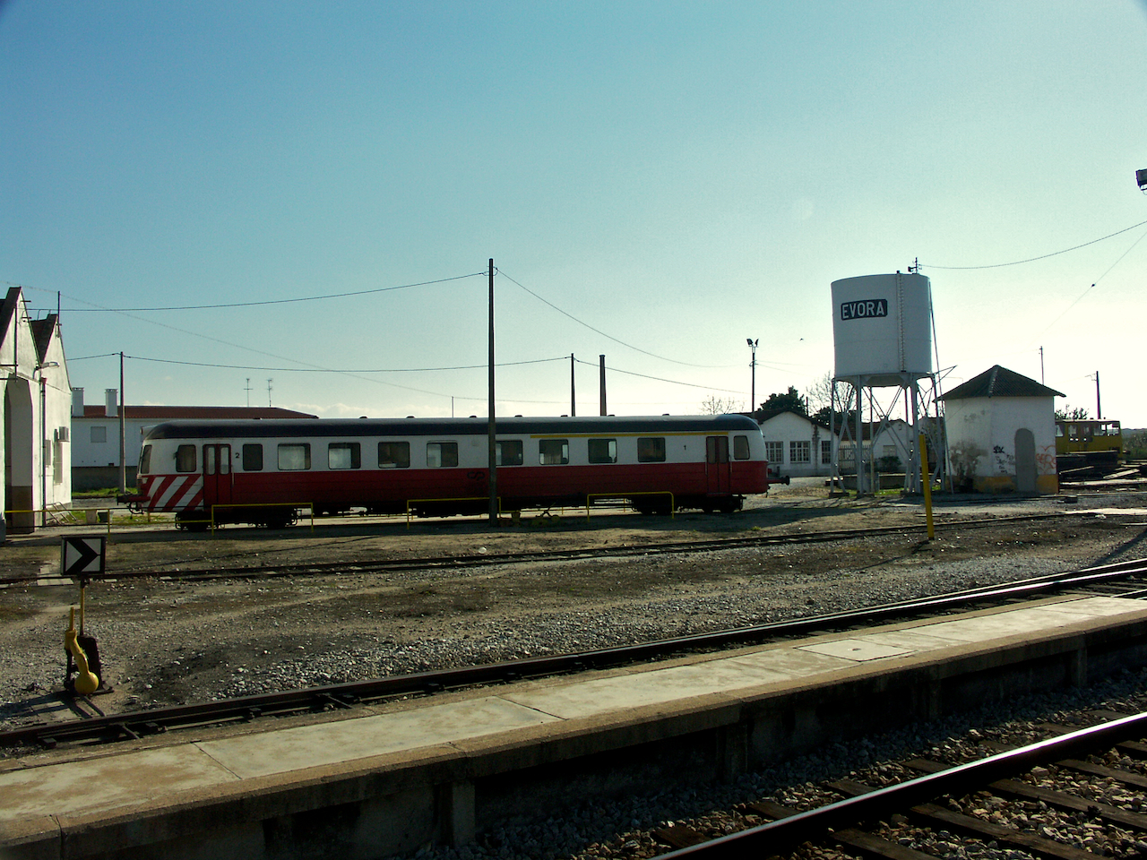 Local: Estação de Évora [Linha de Évora, PK 116] Data e hora: 4 de Dezembro de 2004 [13h23] Material: Automotora 0113 [Unidade Simples Diesel - Nohab] e, depois dos solavancos, o merecido descanso do material. vídeo desta viagem aqui.